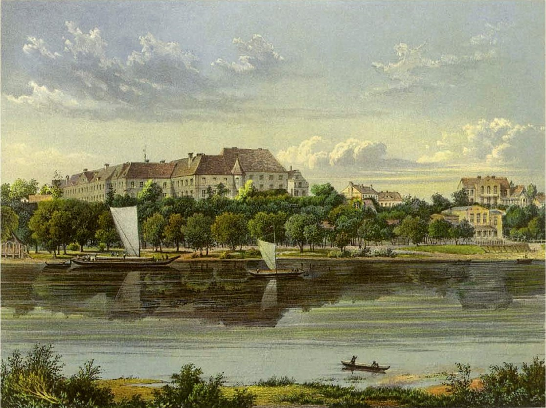 Schloss Carolath, Kreis Freistadt